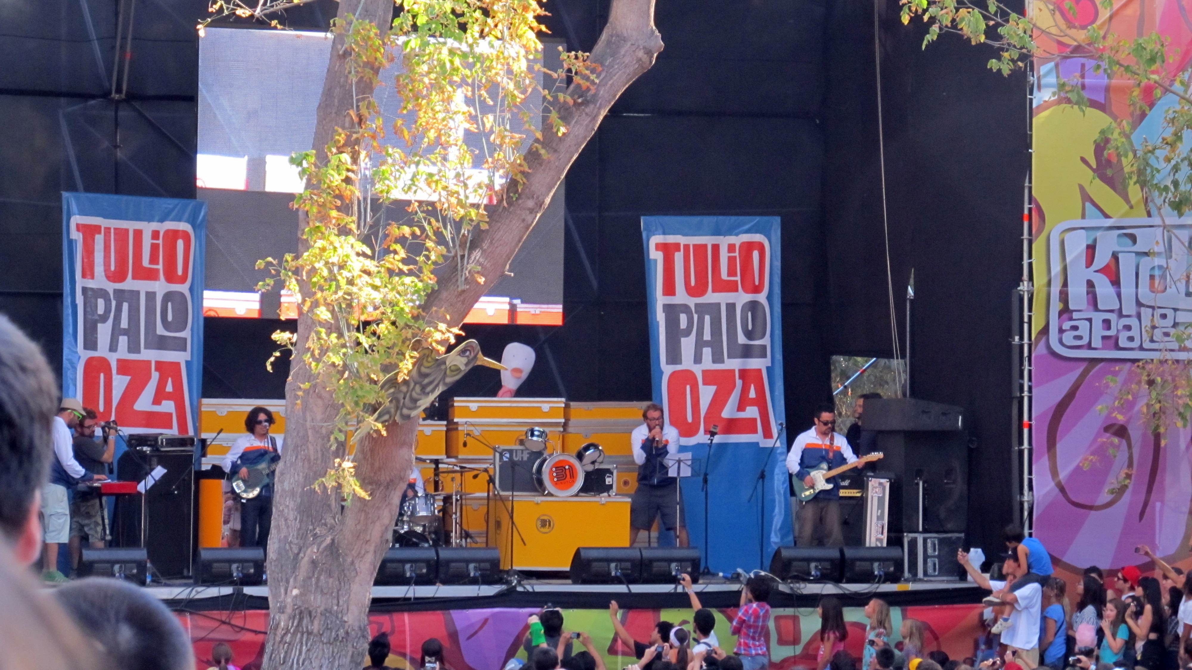 Tuliopalooza